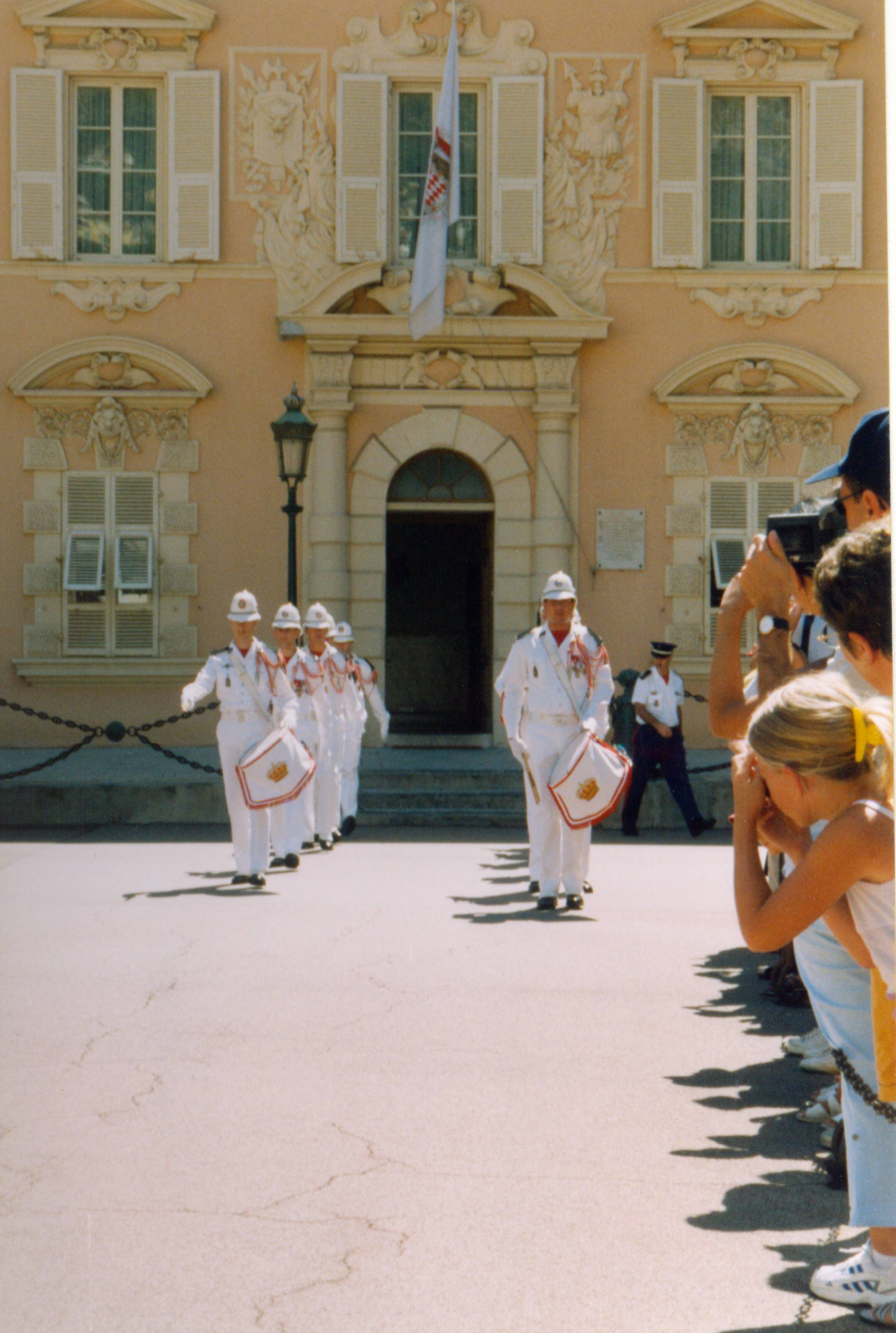 Wisseling van de wacht in Monaco, self made picture